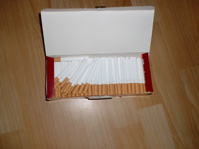 Verschluss für Filterhülsen